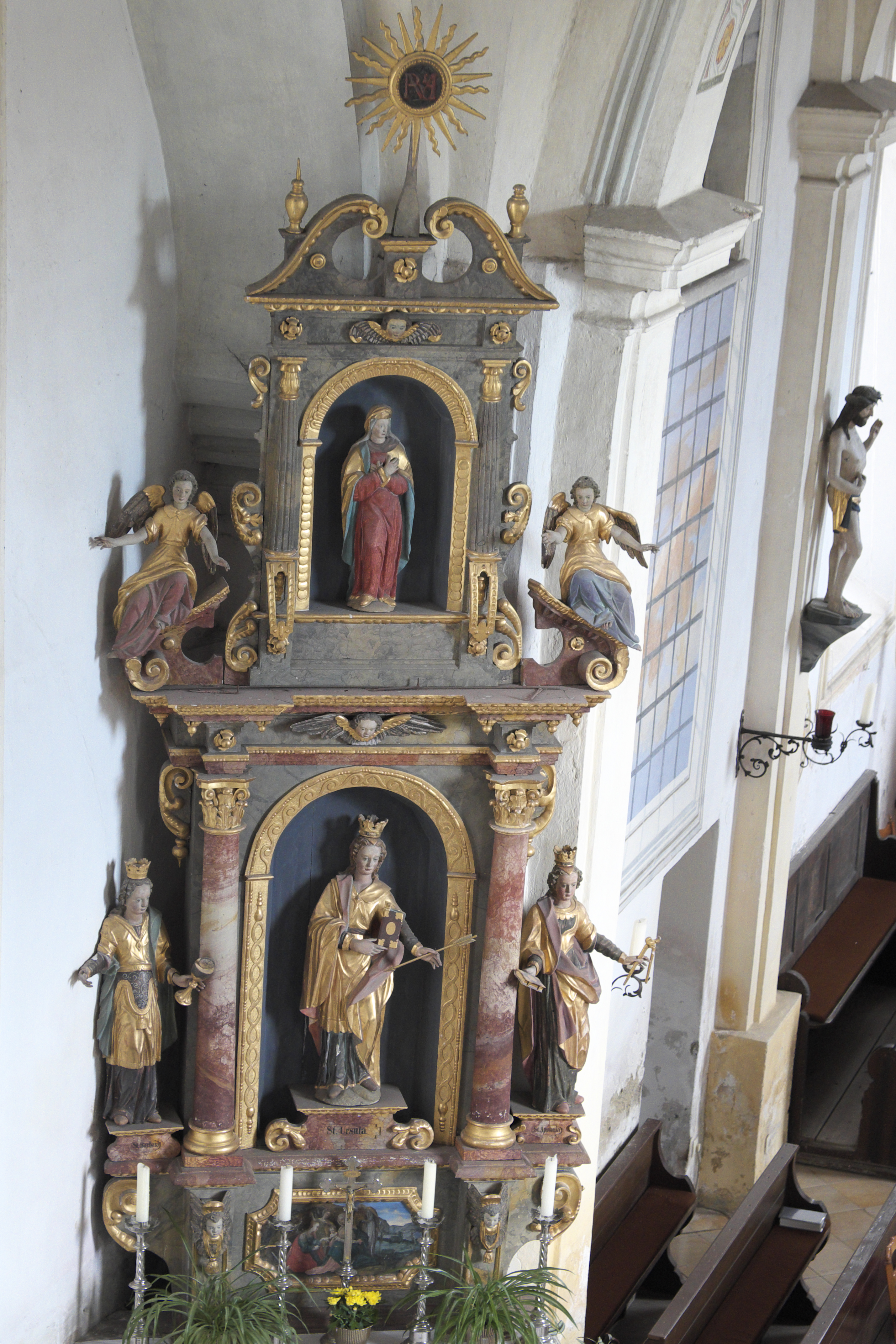 Katholische Filialkirche Mariä Himmelfahrt in Lampferding (Tuntenhausen) im Landkreis Rosenheim (Bayern/Deutschland), Seitenaltar